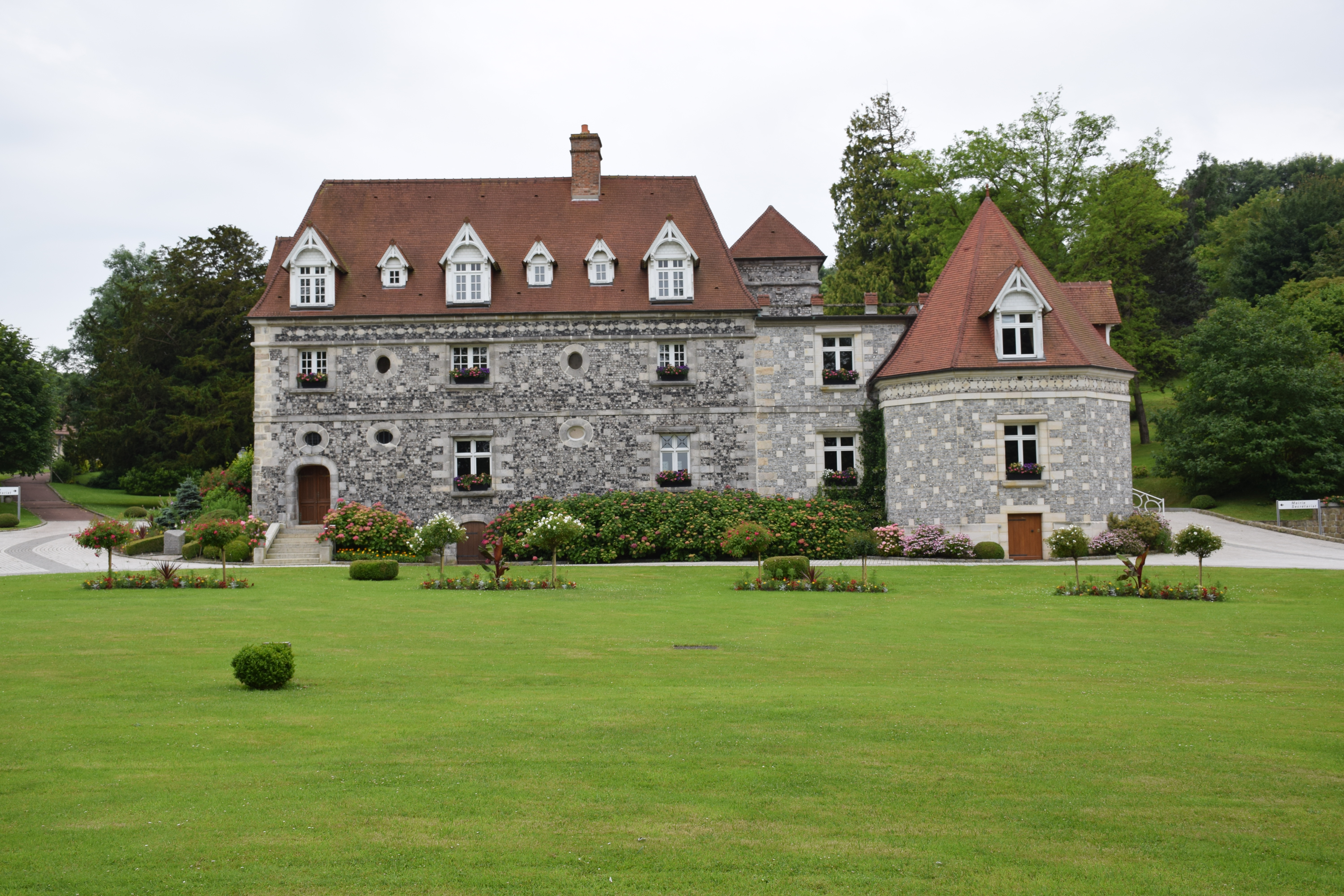 Mairie Rouxmesnil Bouteilles 76